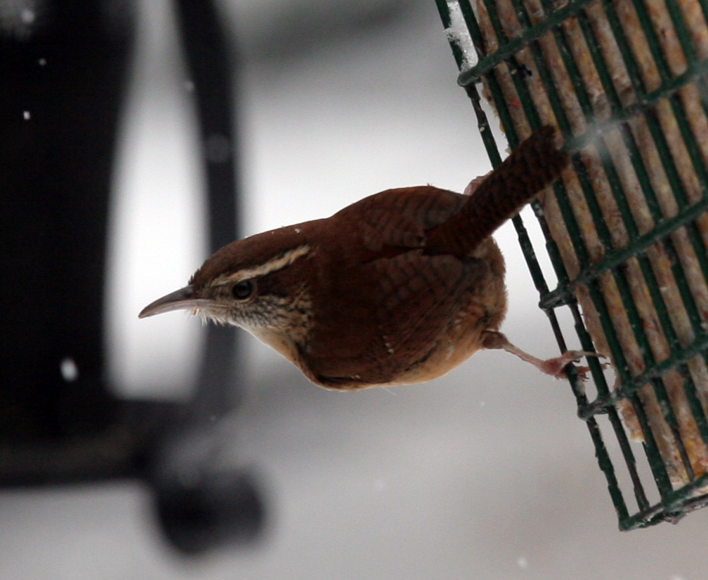 Carolina Wren